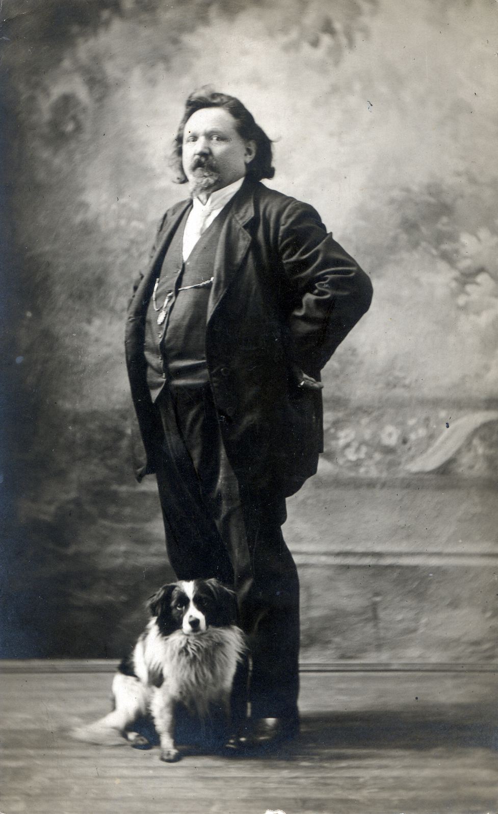 Foto di Rodolfo Gambini